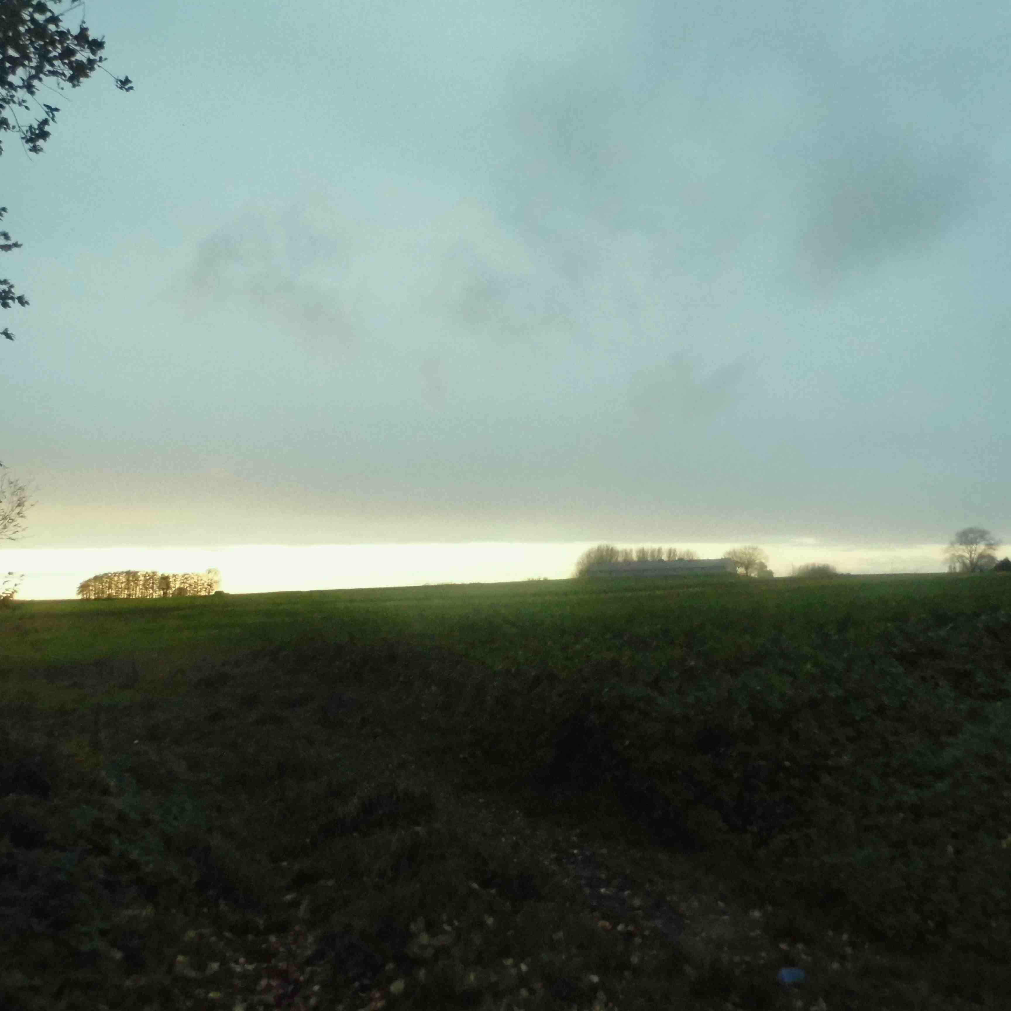 Chemin de campagne du côté de Silly